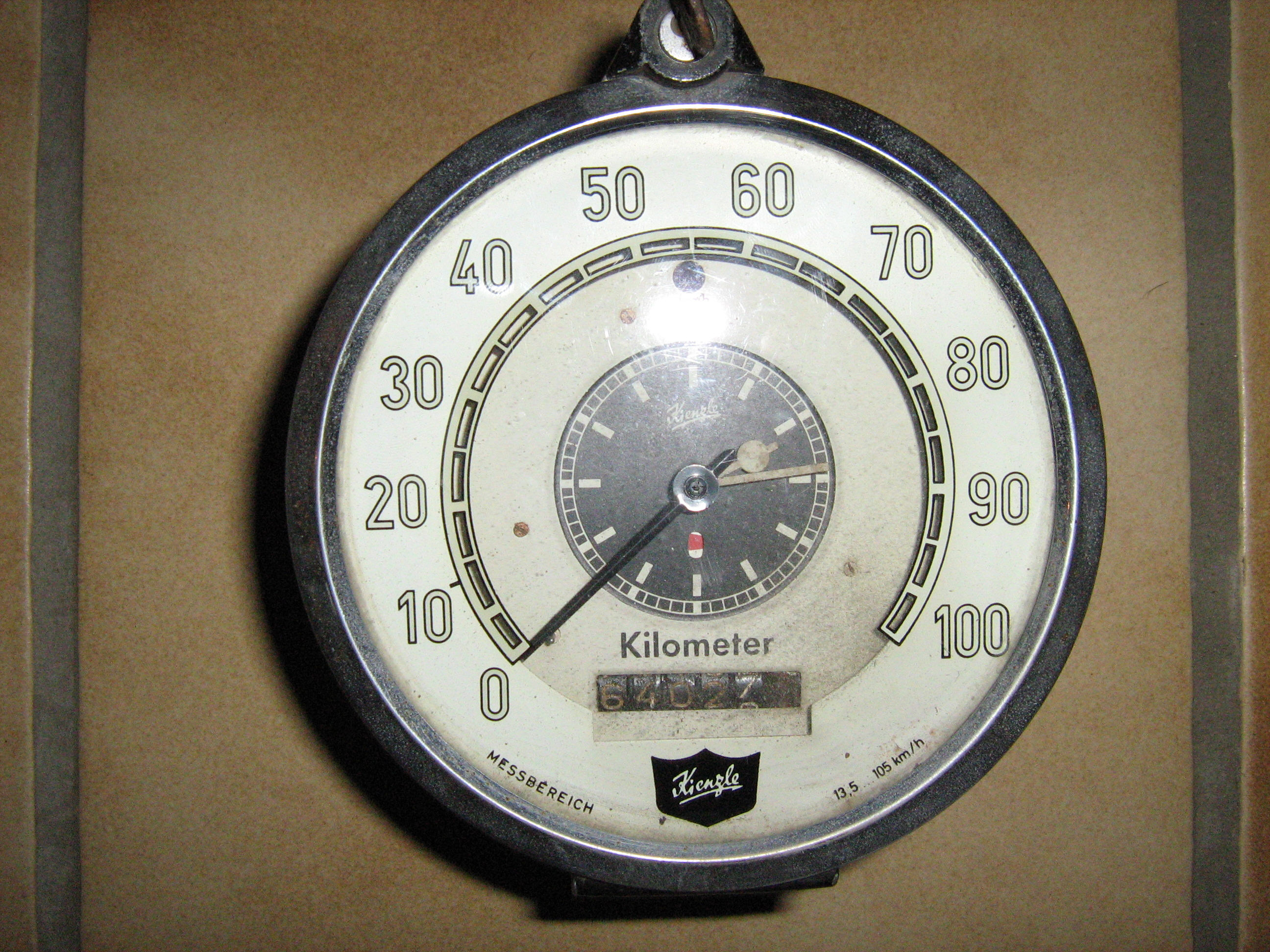 LKW Tachograph Bj.9.1958